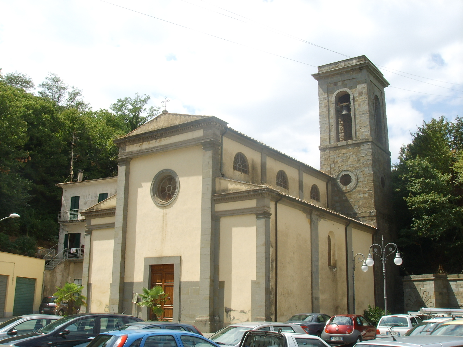 Scansano, madonna delle grazie